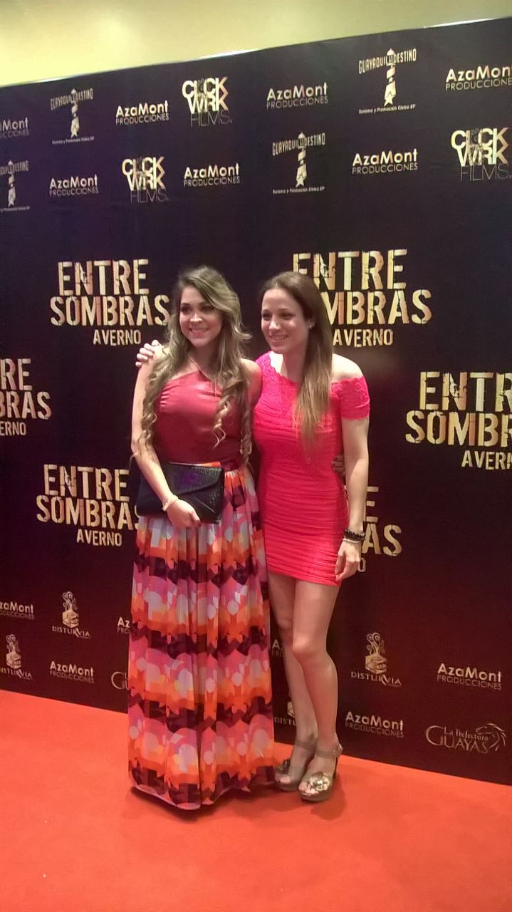 Alexa Zambrano y Daniela Vallejo en el Avant Premier de E. S. Averno